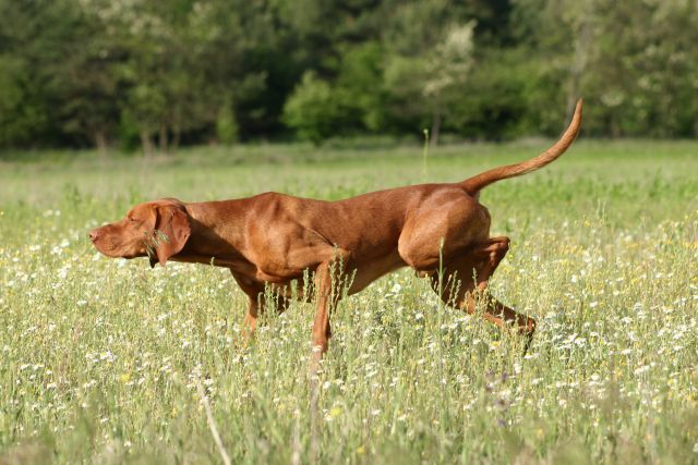 vizsla ráhúz a vadra